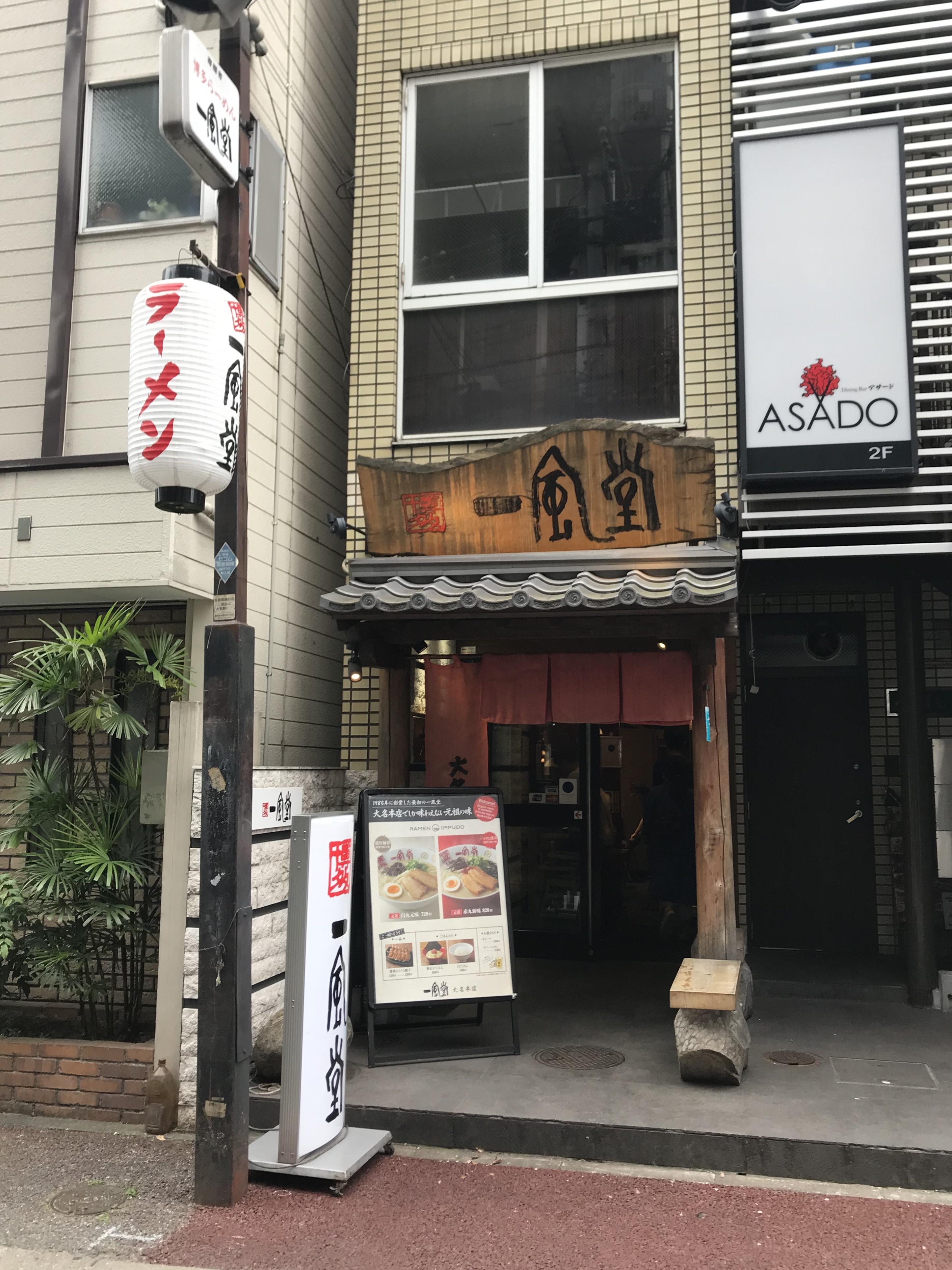 博多一風堂大名本店